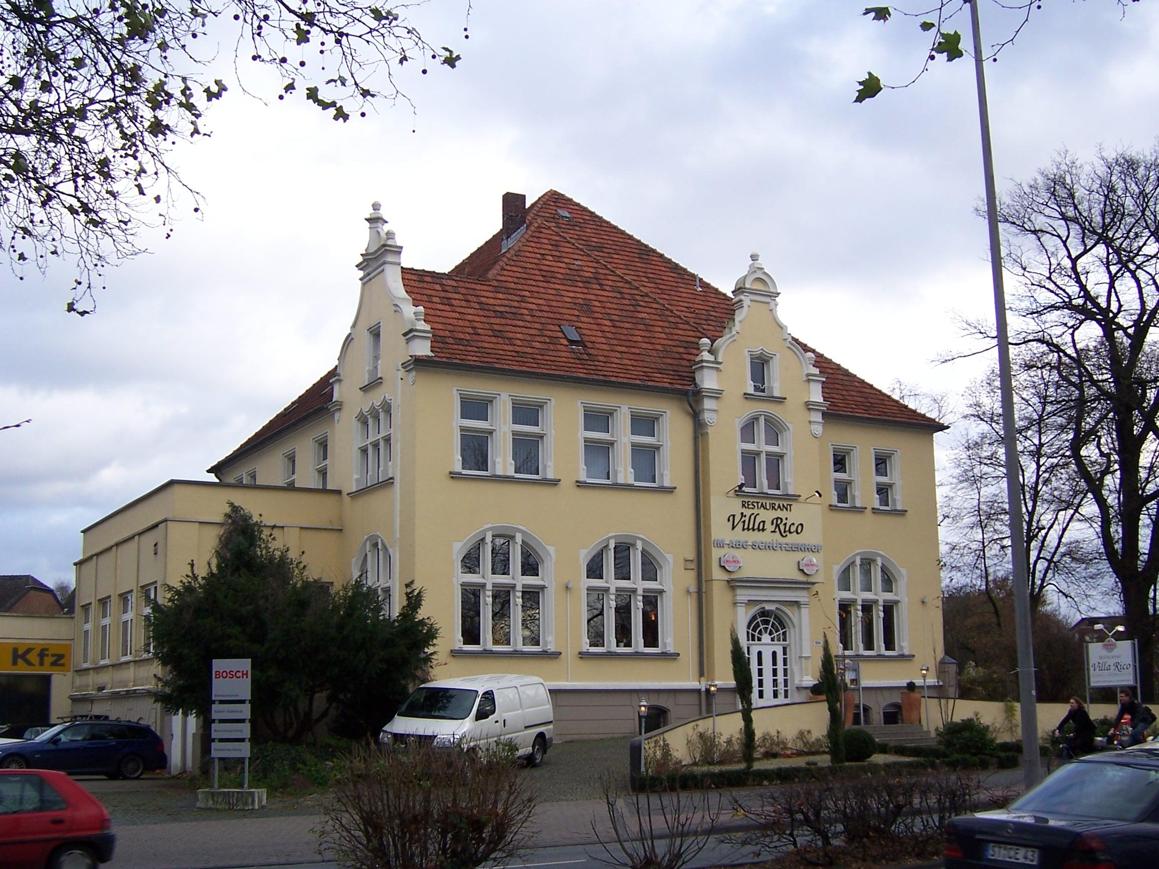 Ehemaliges Offizier-Kasino des Kürassierregimentes Nr. 4, Münster